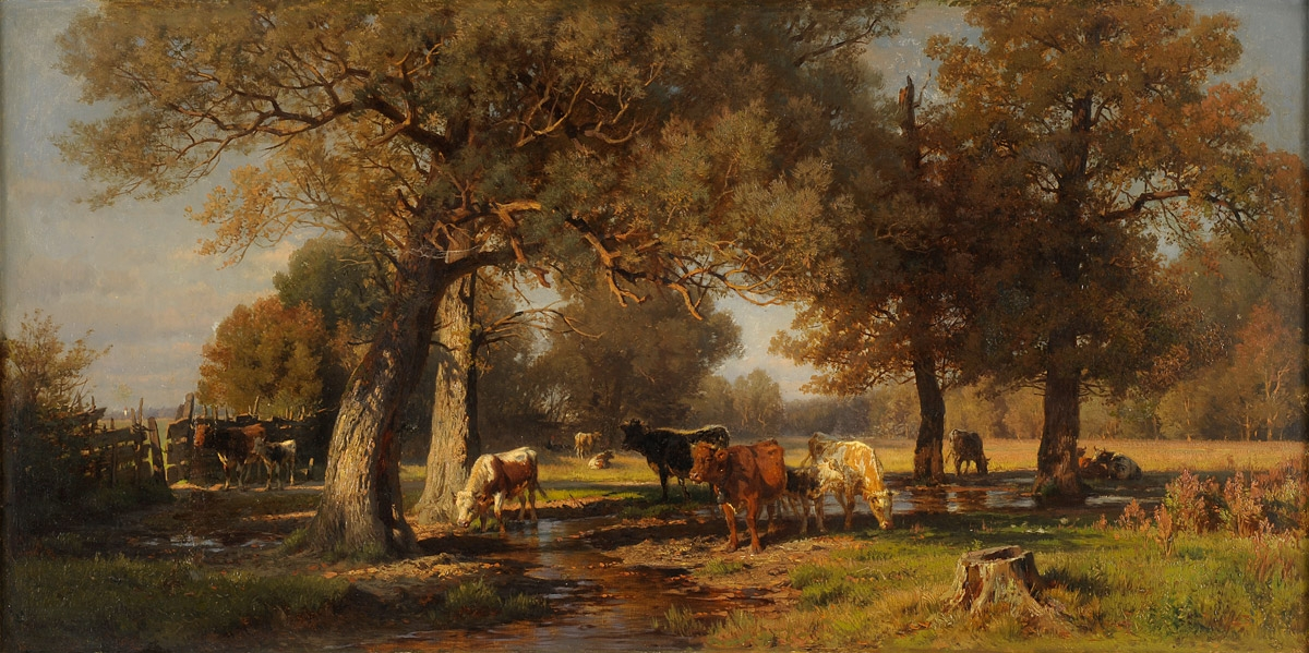 Sommerliches Weideidyll. Signiert. Datiert 1877. Öl auf Leinwand, 60 x 116 cm.